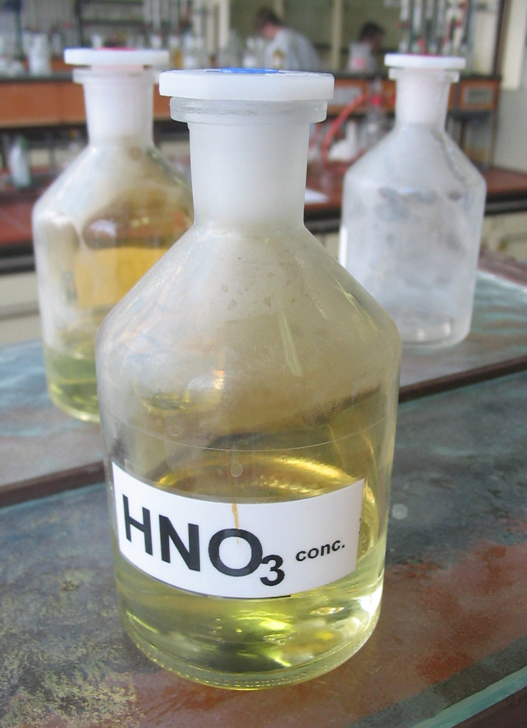 Salpetersäure HNO3